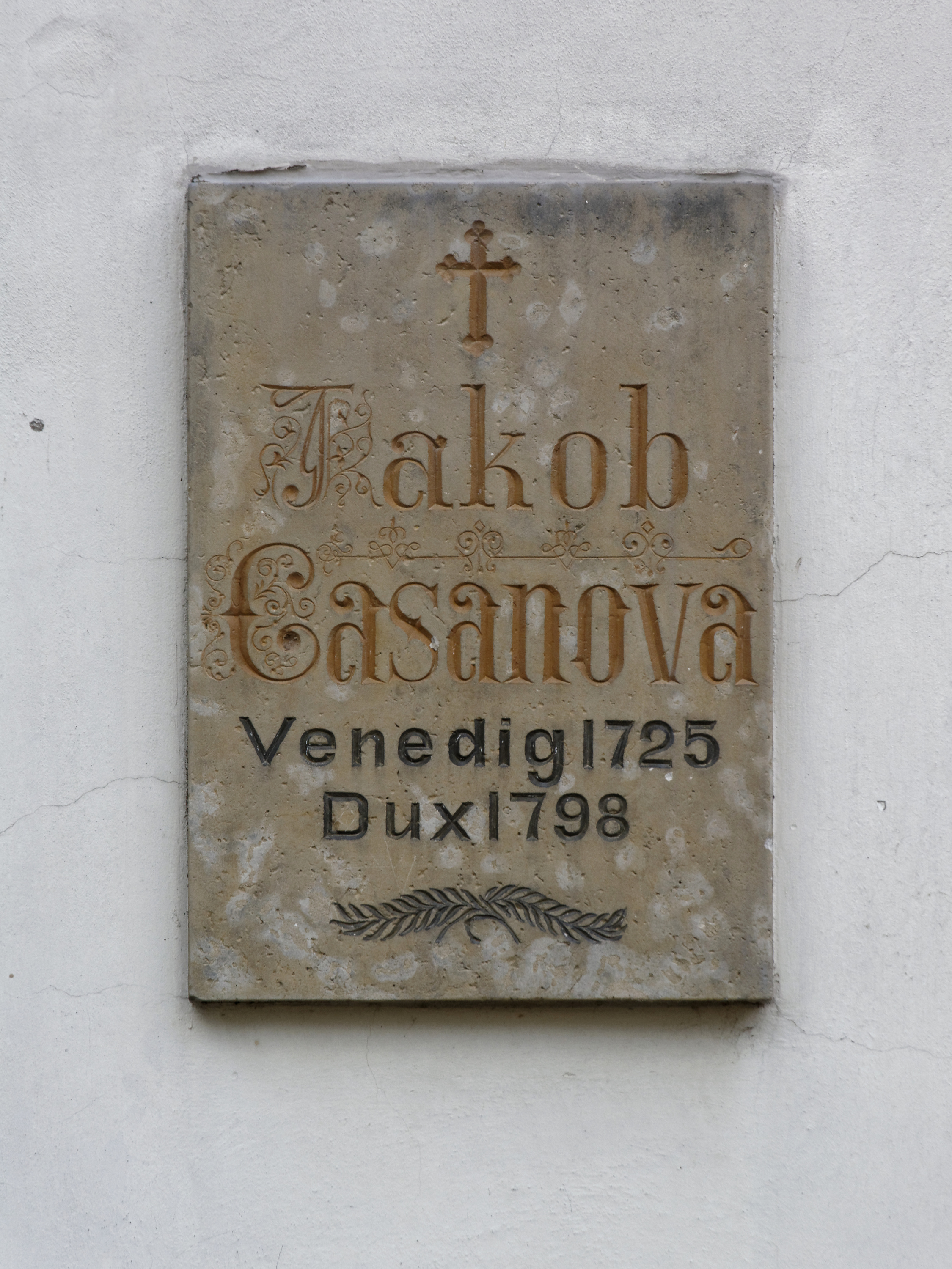 Kaple svaté Barborty v Duchcově. Pamětní deska Giacoma Casanovy.